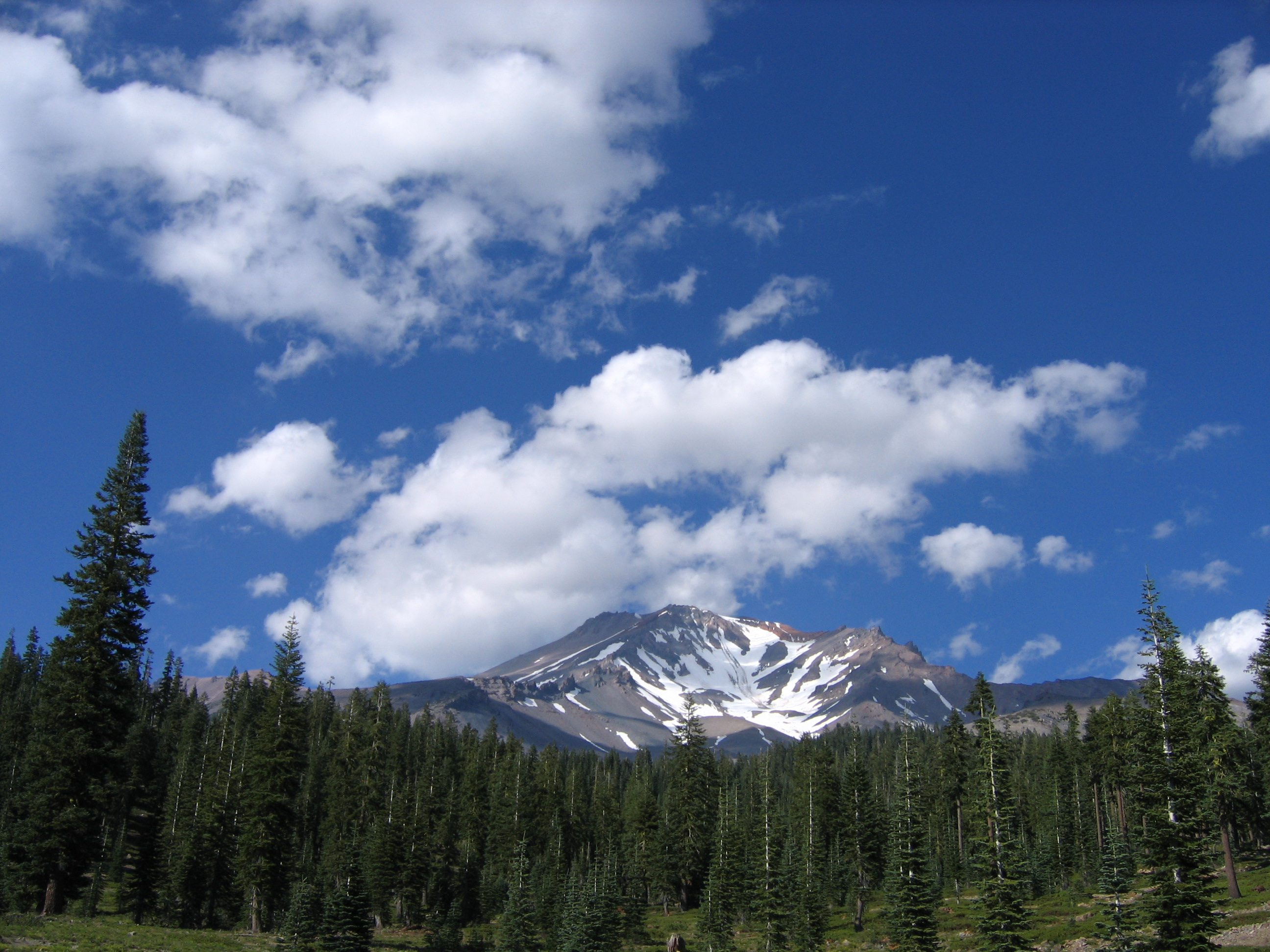 Le Mont Shasta vu depuis Bunny Flat, avec Abies magnifica.